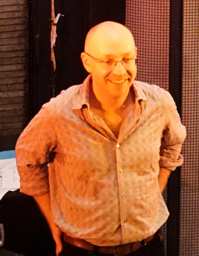 En concert à la Villa Douce à Reims.